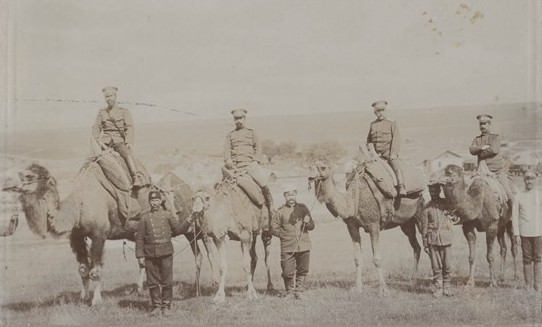 Снимка на офицери от Щаба на Четвърта пехотна преславска дивизия във военно облекло.